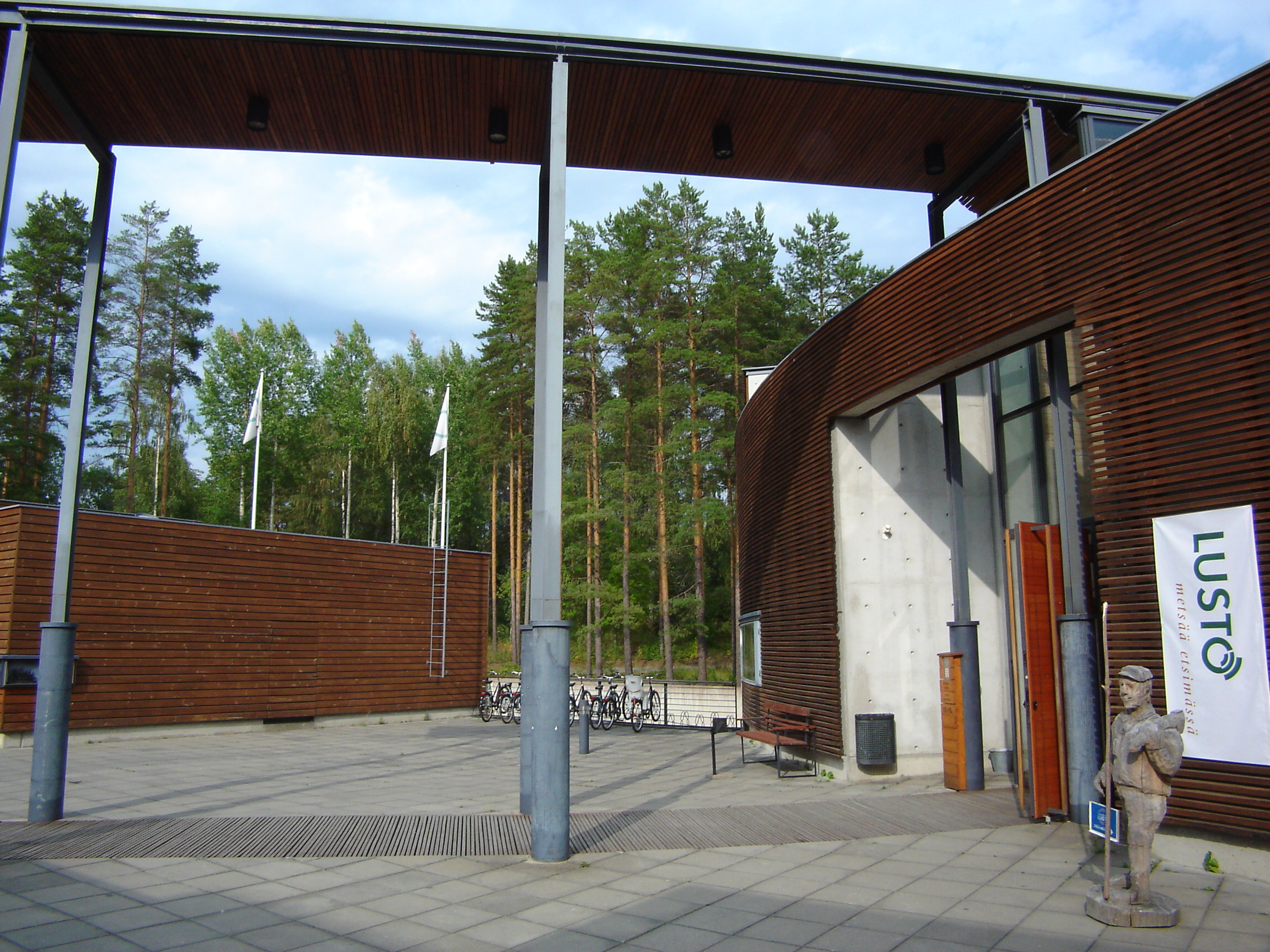 Lusto forest museum, Punkaharju, Finland